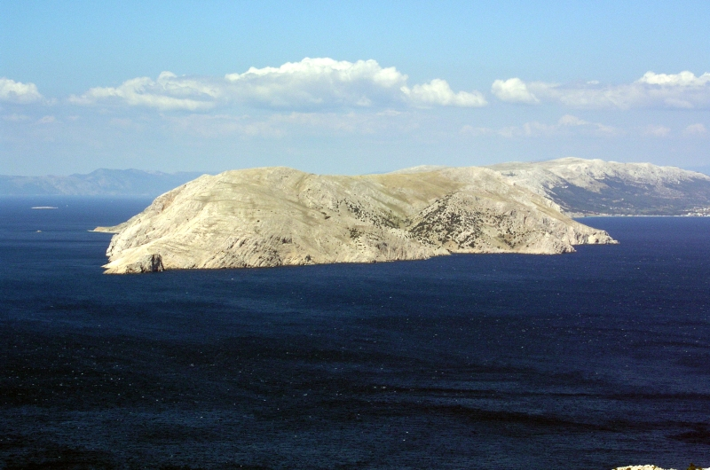 Otok Prvić, Croatia